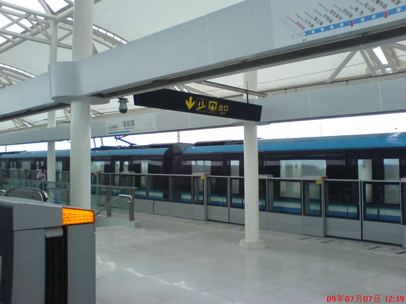 联航路站站台